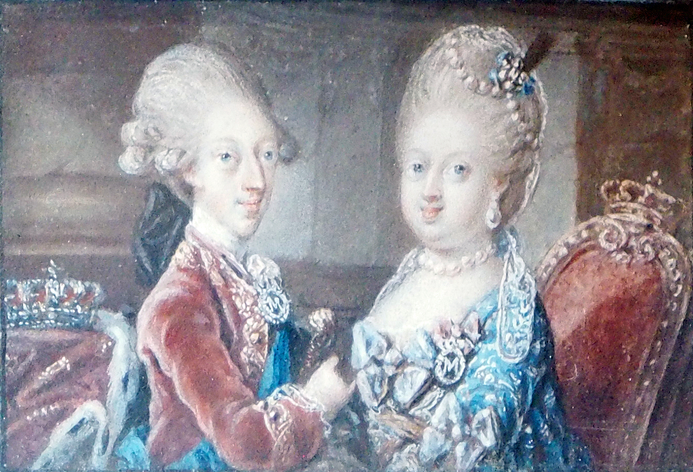 Miniaturbildnis